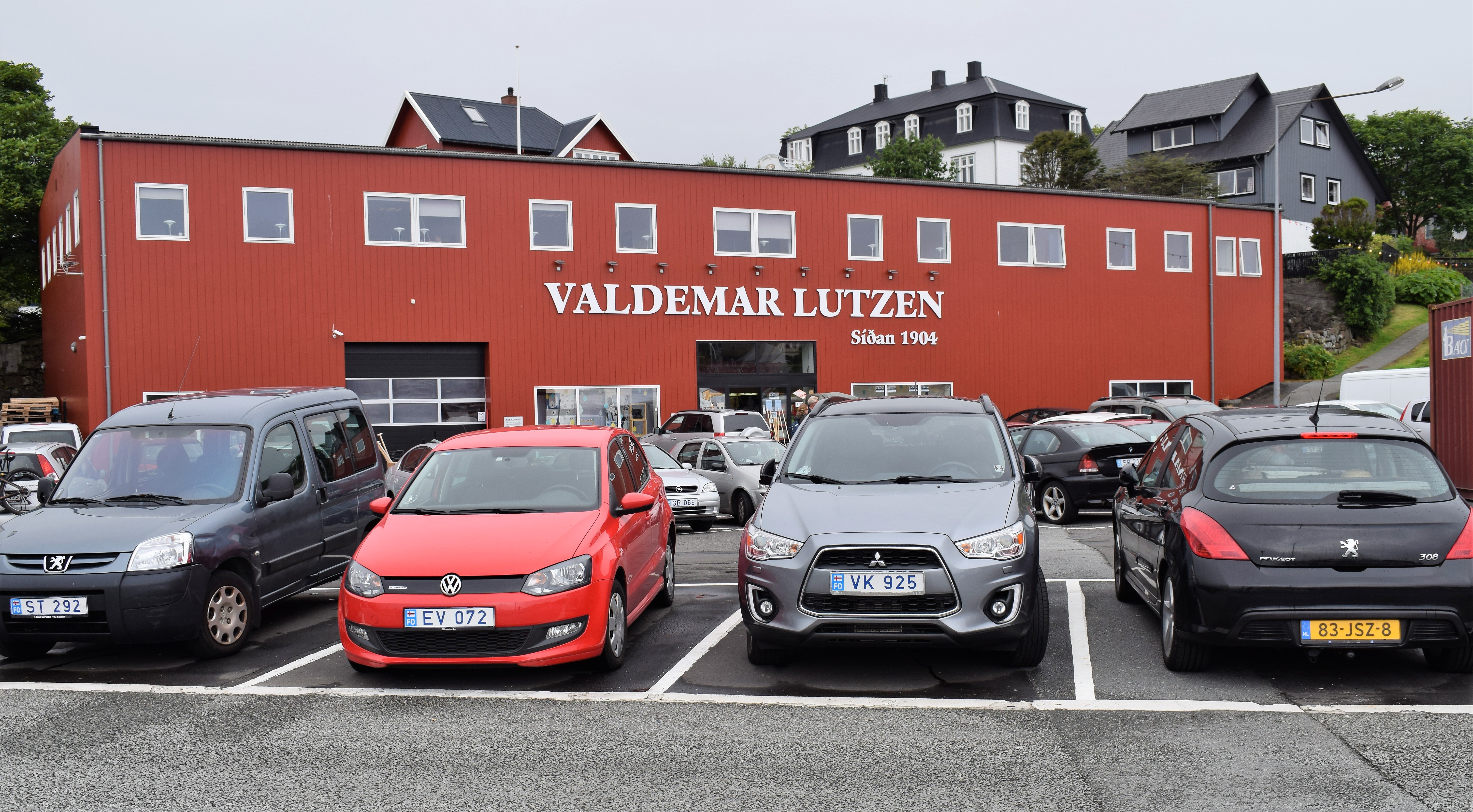 Føroyskt: Amboðshandilin hjá Valdemar Lützen við Vestaravág í Tórshavn. Fyritøkan varð stovnað í 1904